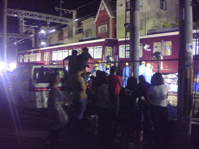 2008年9月20日に阪急甲陽線甲陽園駅で起きた脱線事故の現場。画面左、最後尾の6110が脱線している。